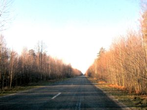 Районная дорога IІІ категории. Наиболее распространённый вид дорог на Украине.